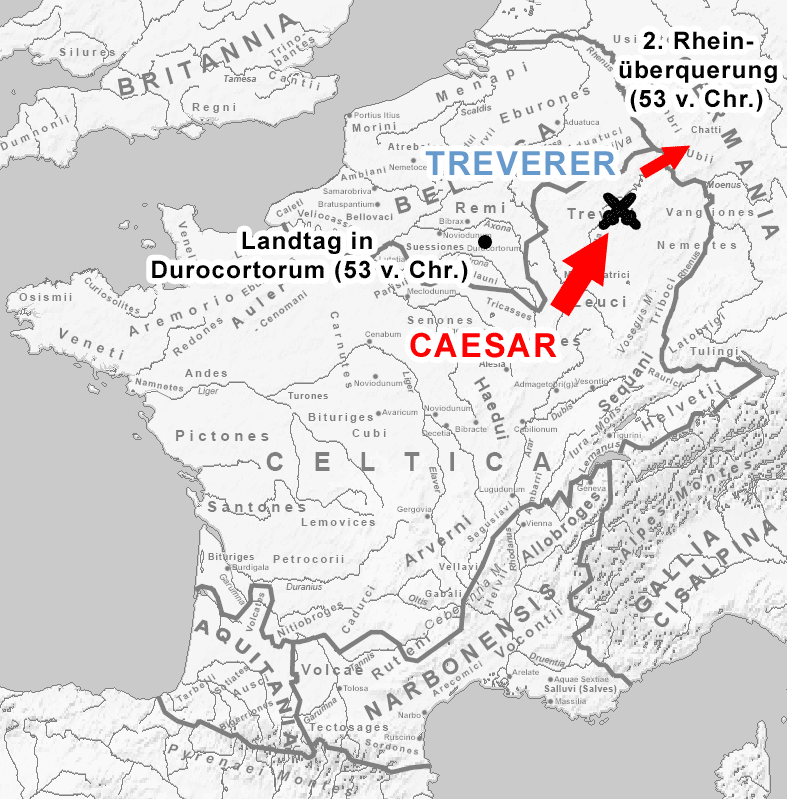 6. Buch De bello Gallico